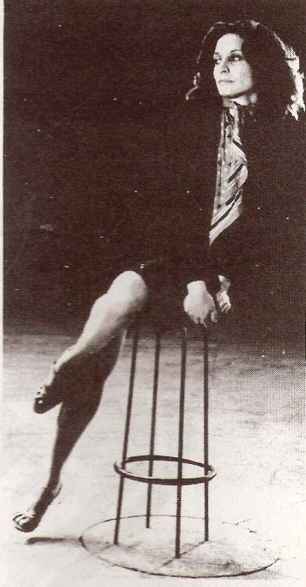 Iris Scaccheri, bailarina argentina